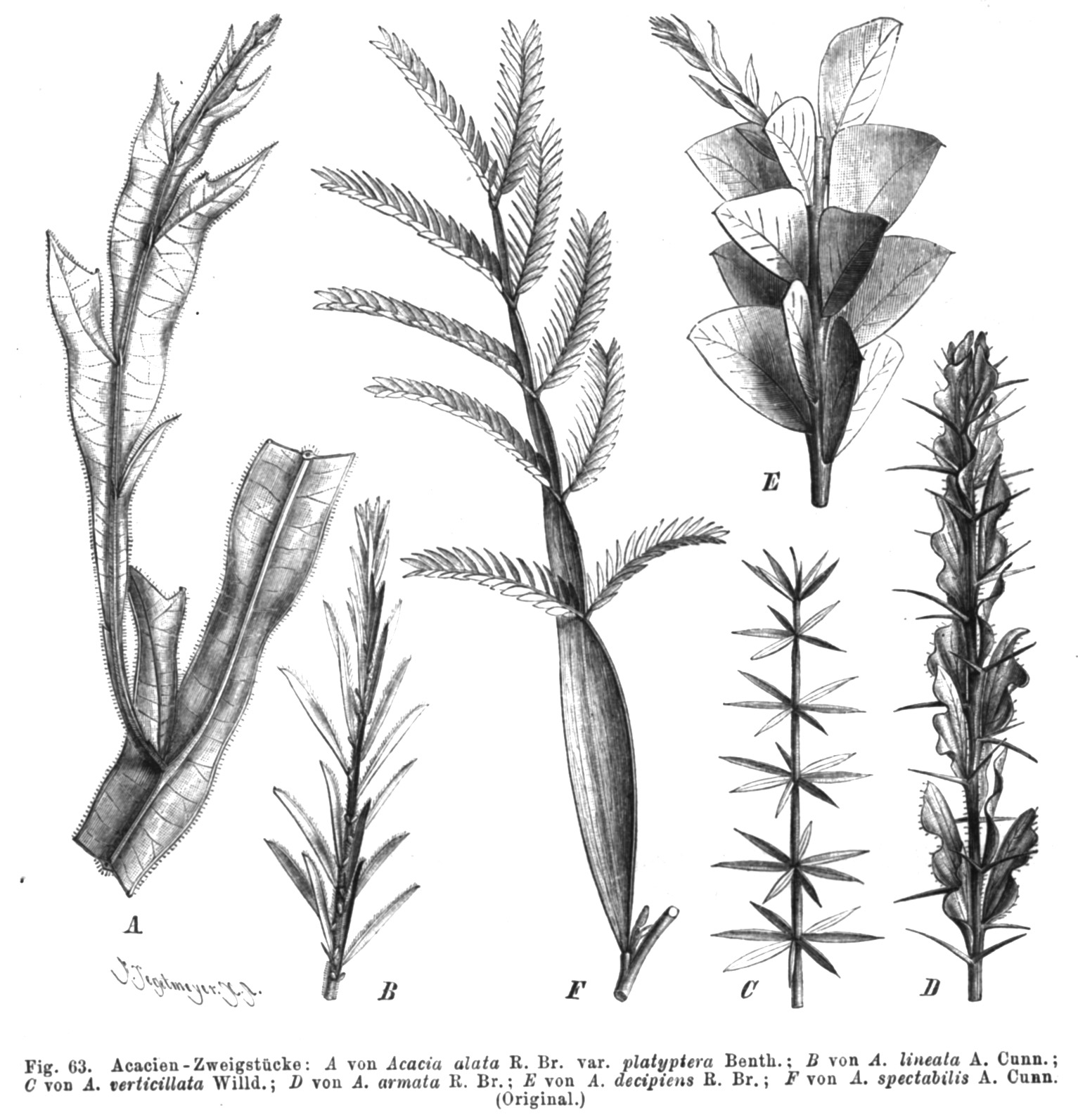 Illustration from book Fig A Acacia alata var. platyptera; B Acacia lineata; C Acacia verticillata; D Acacia paradoxa = Accia armata; E Acacia truncata = Acacia decipiens; F Acacia spectabilis